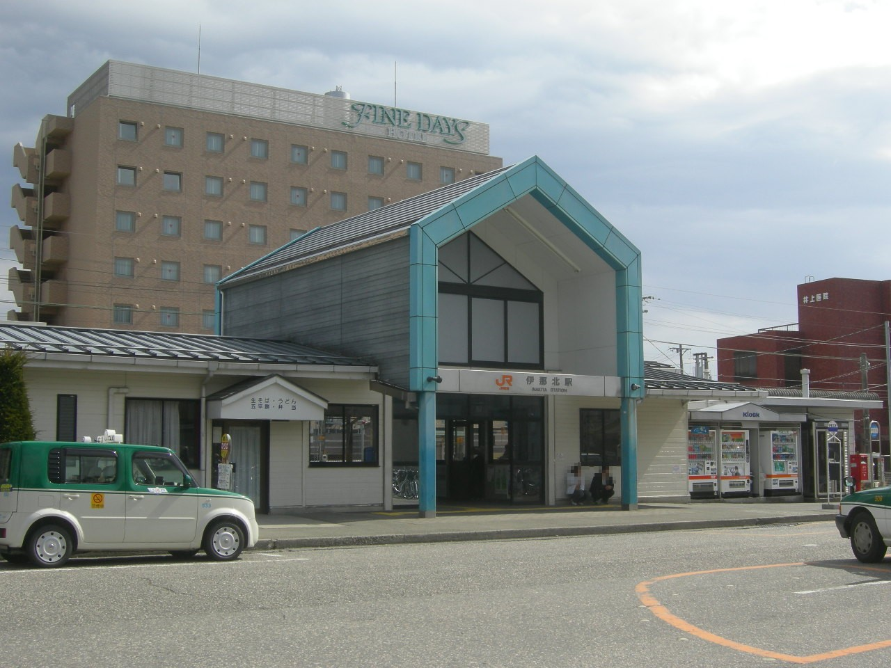 JR東海飯田線 伊那北駅駅舎（JR Tokai Iida line,Inakita station）